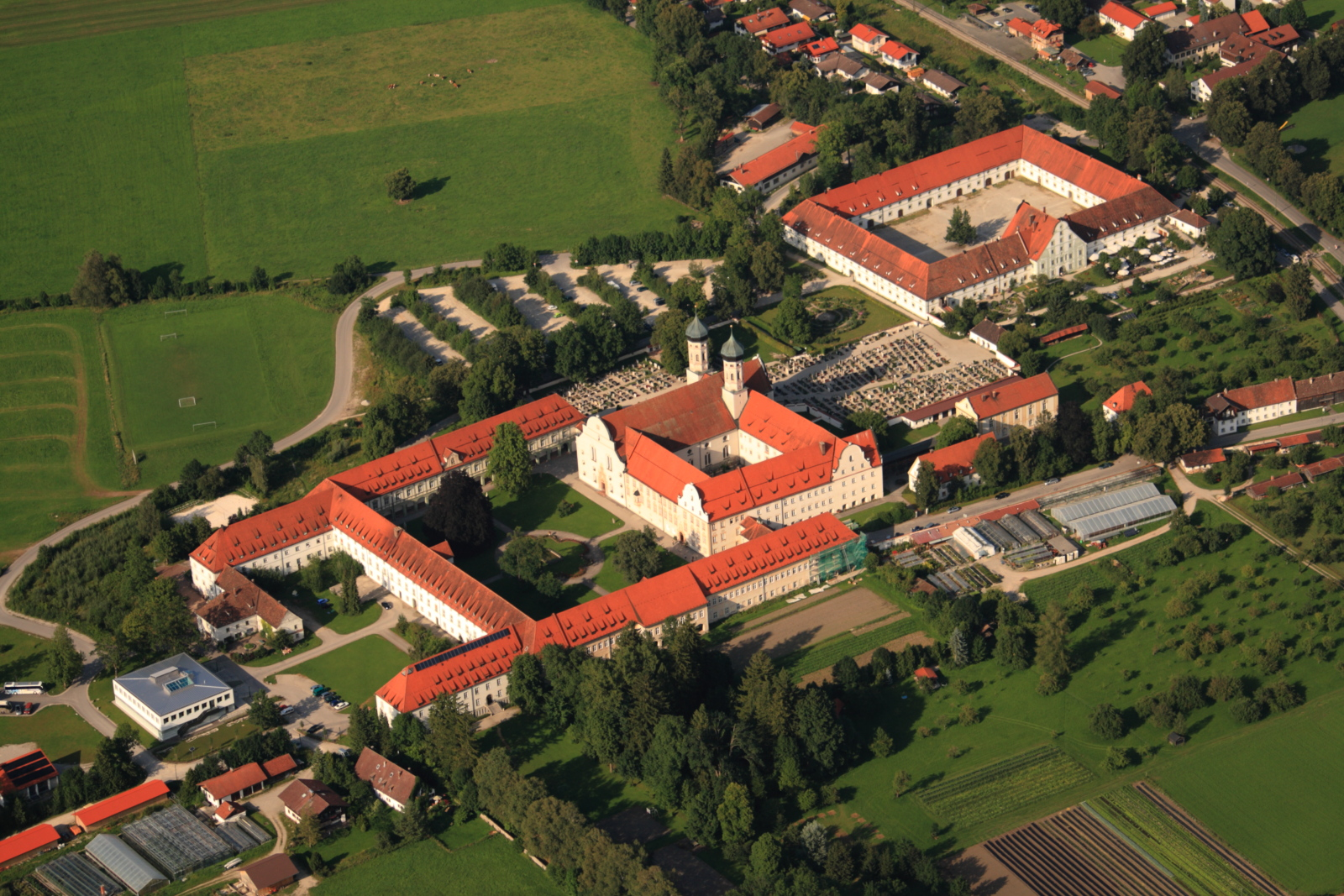 Klosteranlage Benediktbeuern, Mensa, Aktionszentrum, Jugendherberge, Schmiede, Klosterhof, Basilika, Anastasiakapelle, Konvent, Fachhochschule, Klostergärtnerei, Bibliothek, Klostermauer, Friedhof, Meierhof mit KlosterbräustüberlThis is a photograph of an architectural monument.